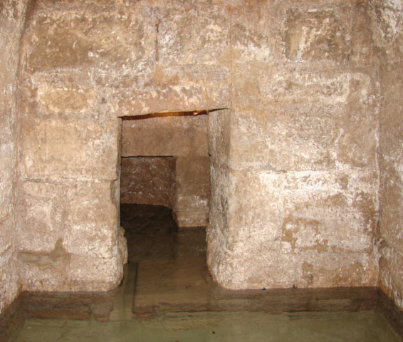 El Acueducto “La Madre” es una obra de arquitectura civil de autoría y época de construcción desconocidas. Se encuentra en el centro de tres valles, en un paraje bastante árido. Se trata de una canalización o acueducto subterráneo de piedra que tenía como fin la recogida y transporte de las aguas de un manantial situado a dos kilómetros de la localidad de Castejón de Monegros hasta la misma. El agua recogida era transportada por este acueducto hasta la fuente del pueblo, lugar al que iban a recogerla sus habitantes. Se pueden distinguir las siguientes partes: acceso y entrada, galería de captación de agua, depósitos de decantación y divertículos de filtración y acueducto de conducción del agua al pueblo, terminando en la fuente.